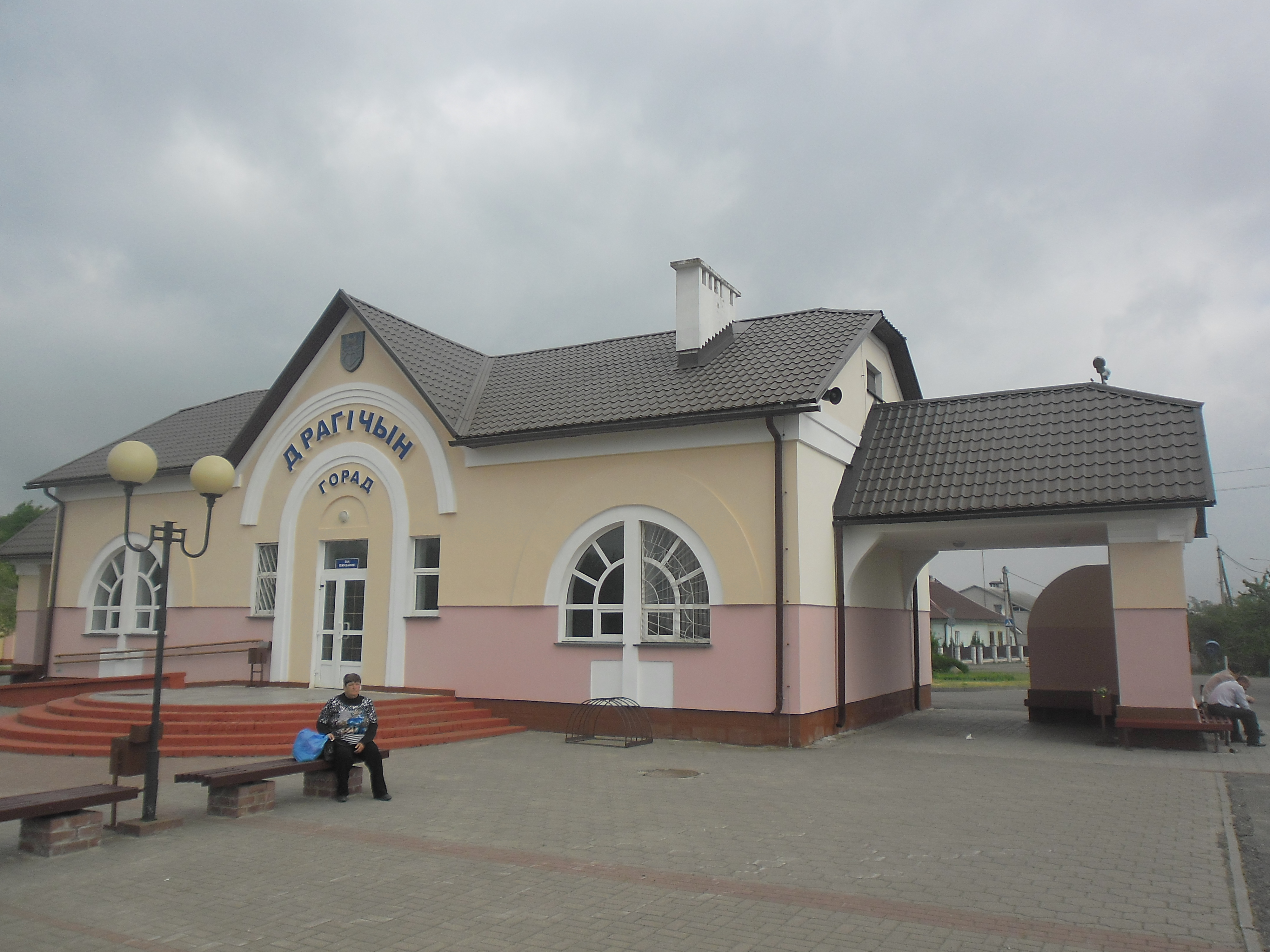 Беларуская (тарашкевіца): Чыгуначны вакзал у Драгічыне